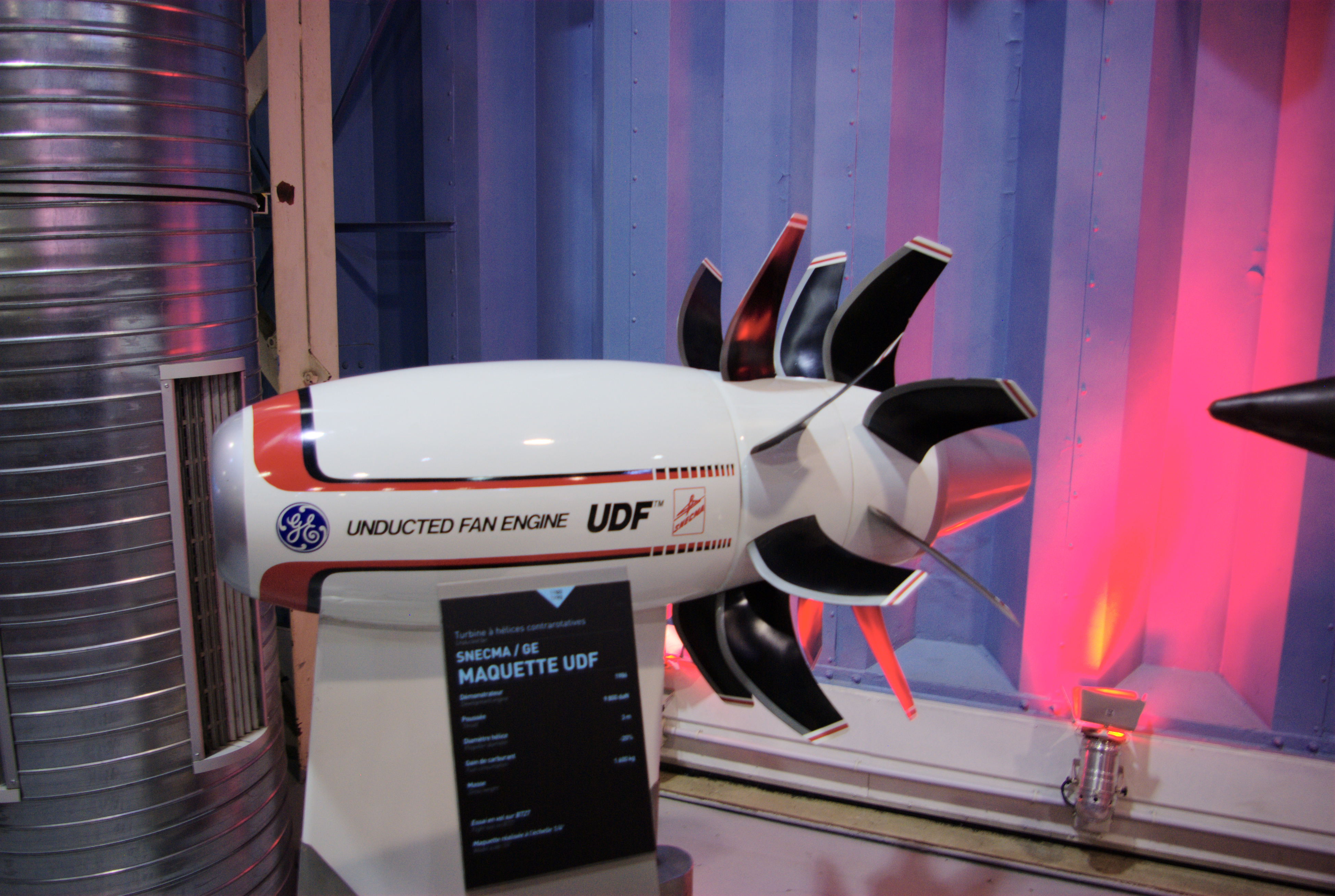 Maquette de l'Unducted Fan engine (UDF) présentée au musée Safran.